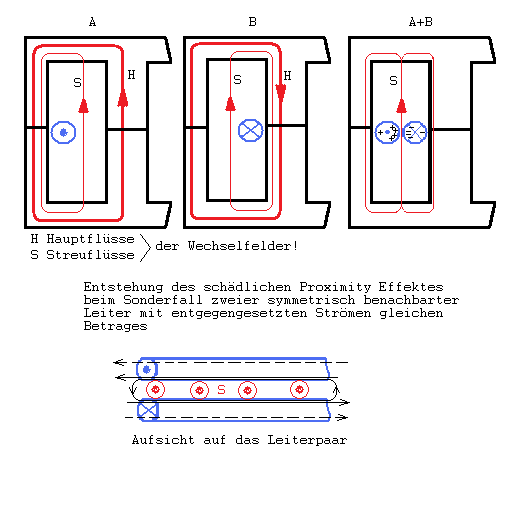 Streufluss2